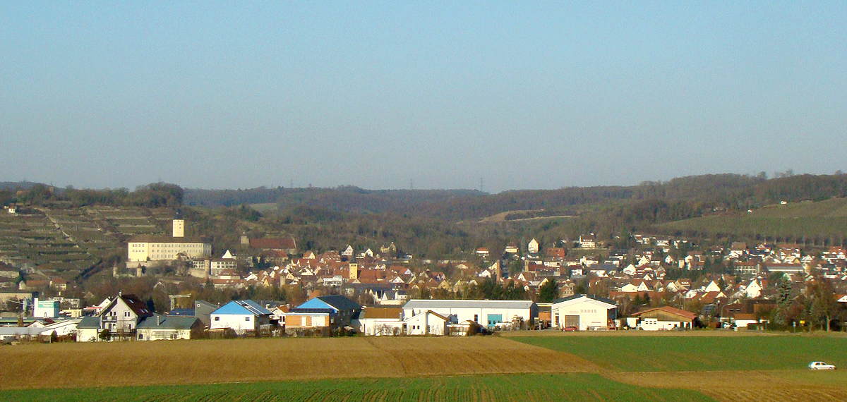 Blick auf Gundelsheim (Württemberg)